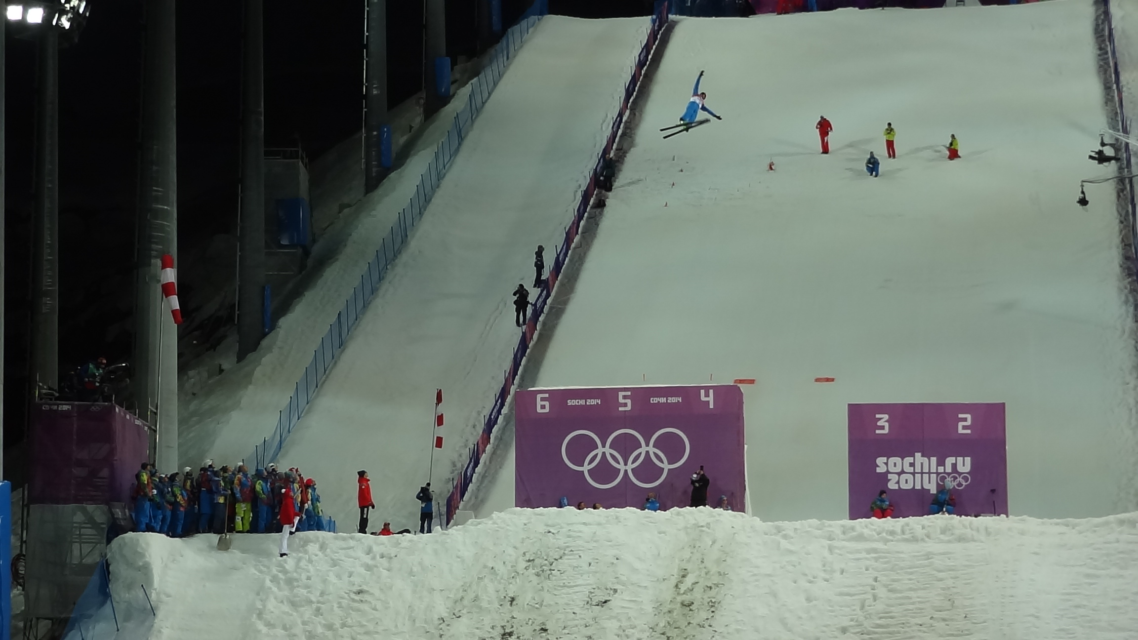 Экстрим-парк «Роза – Хутор» . Сочи, 17 февраля 2014 года. Мужской этап лыжной акробатики по фристайлу.